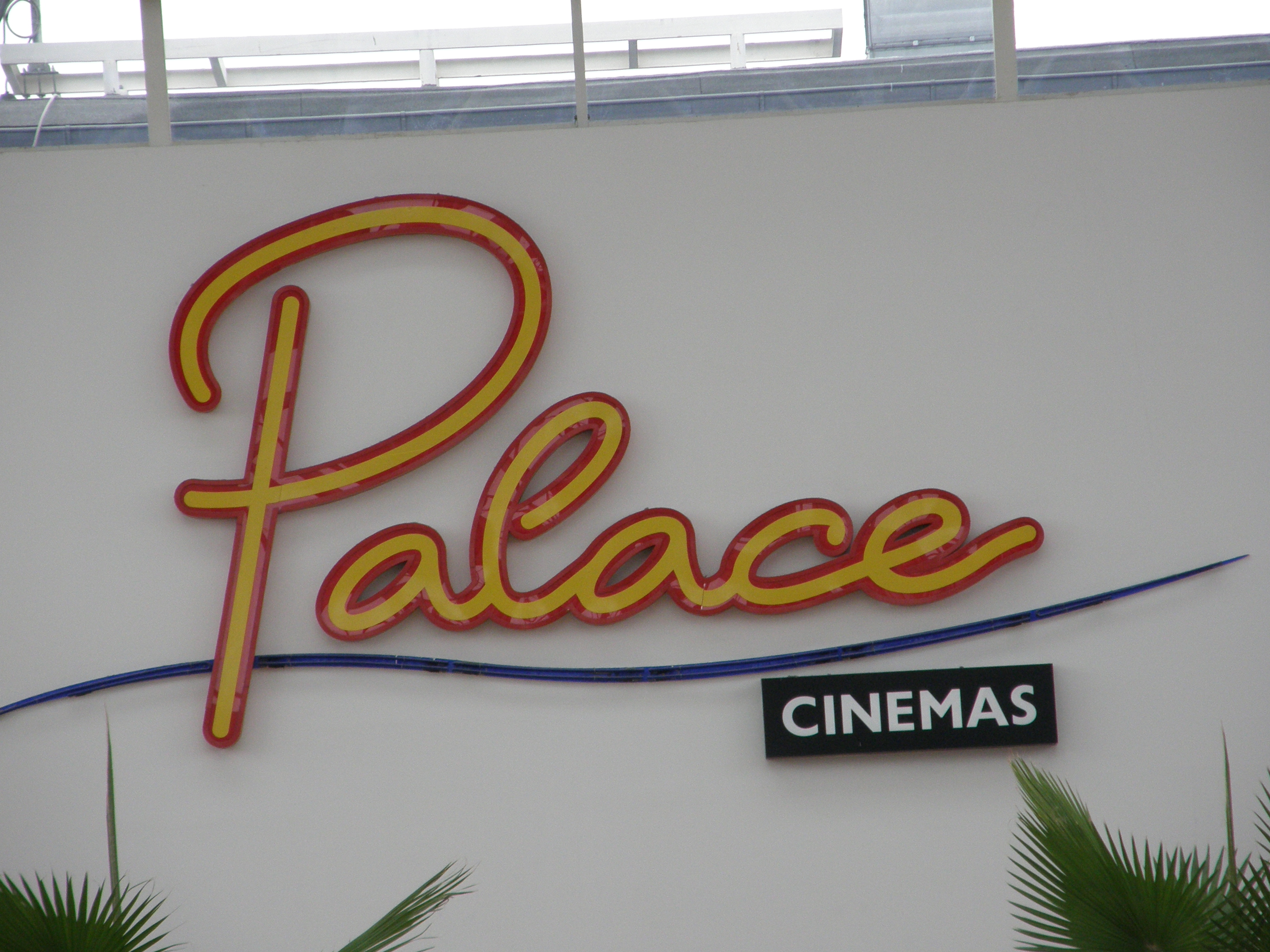 Znak Palace Cinemas v obchodní domě Olympia v Brně